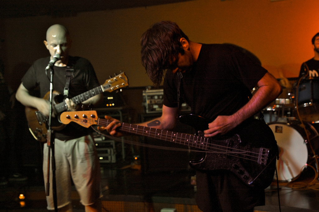 Off minor @ C.C. Sant Feliu de Codines, Barcelona, 2008.06.03